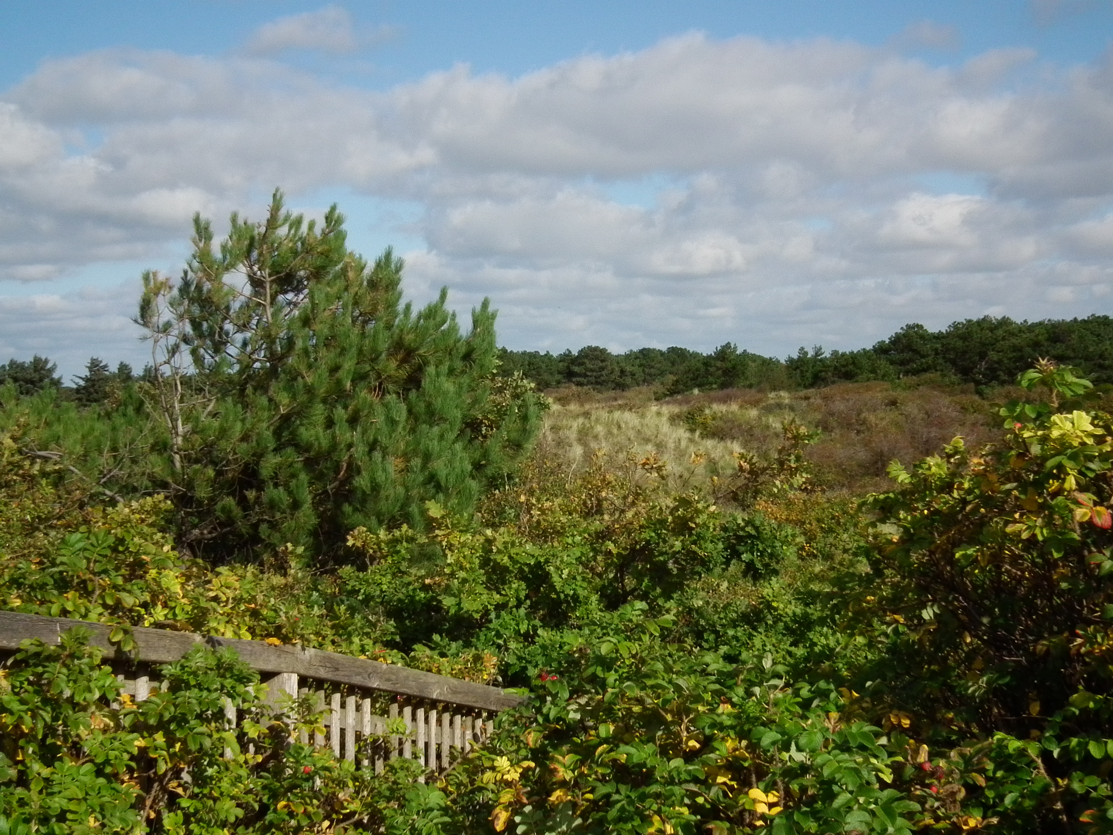 Blick von einer Aussichtsplattform auf Teile des Juister Wäldchens (Niedersachsen, Deutschland)